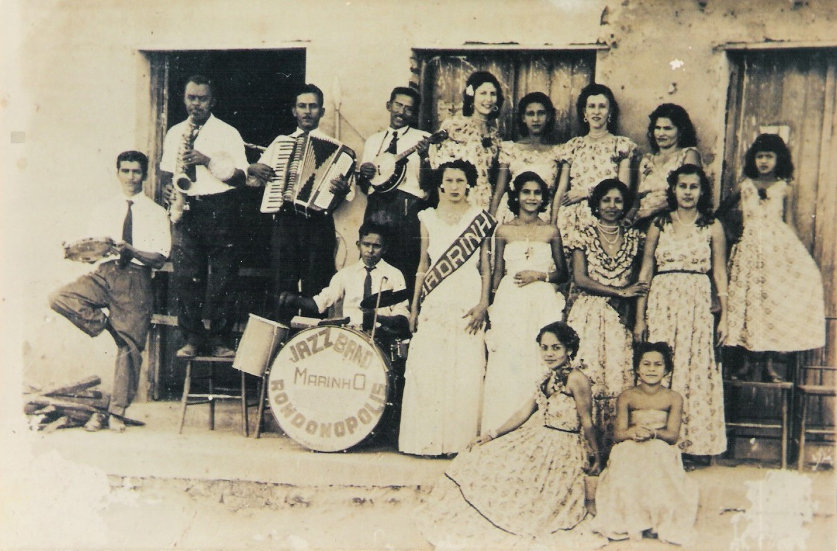 Jazz Band Marinho antes do Baile Rainha do Algodão, na frente do Clube Recreio em 1951.